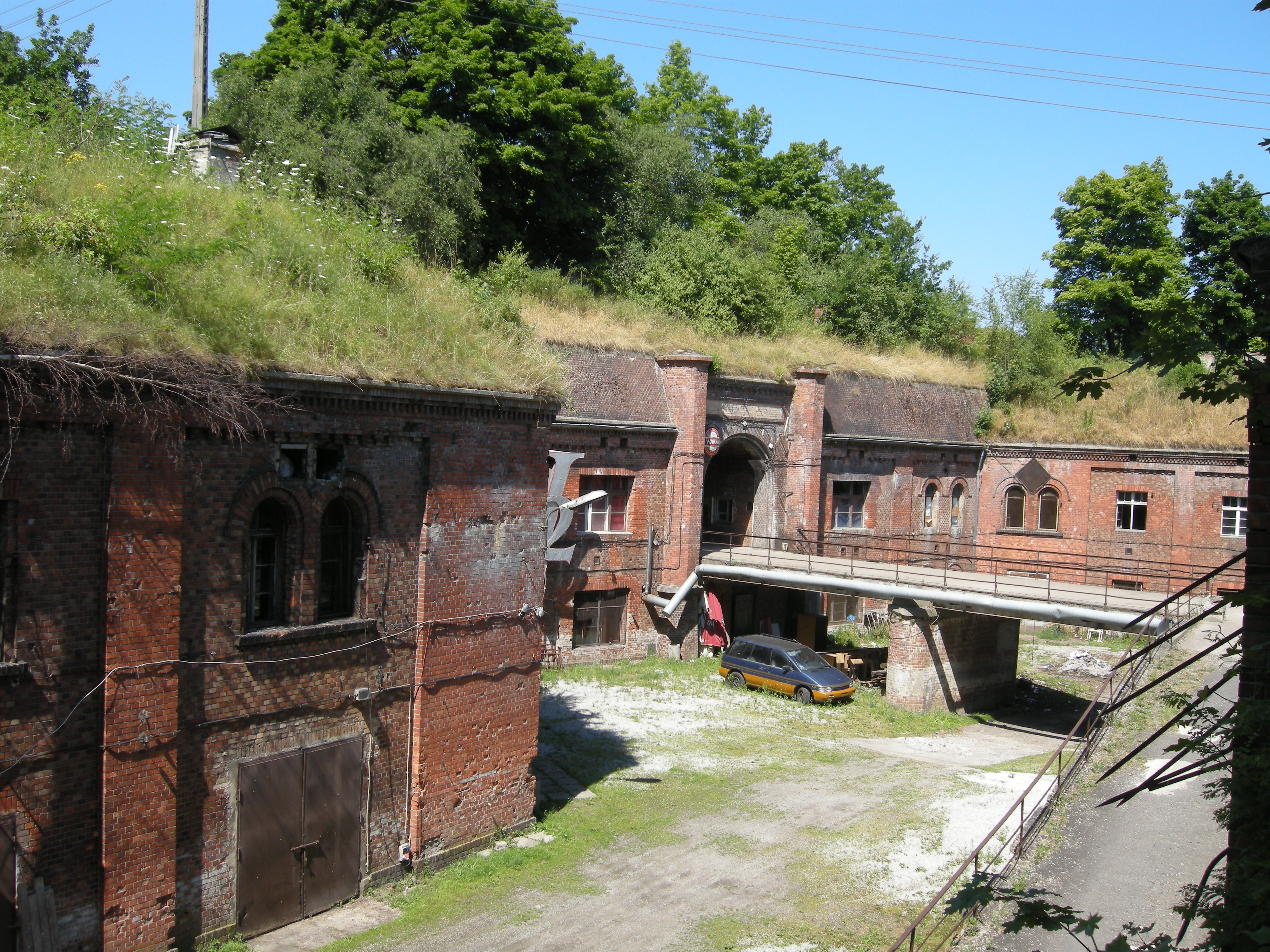 Fort VIII Twierdzy Poznań